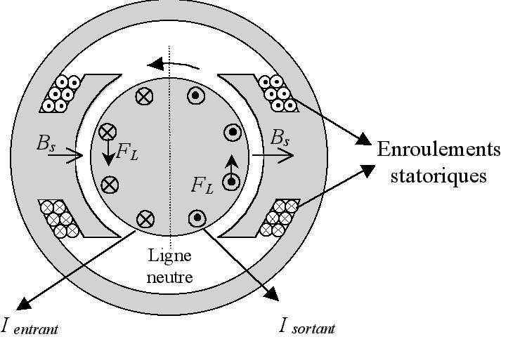 dessin perso (schéma d'une machine à courant continu)